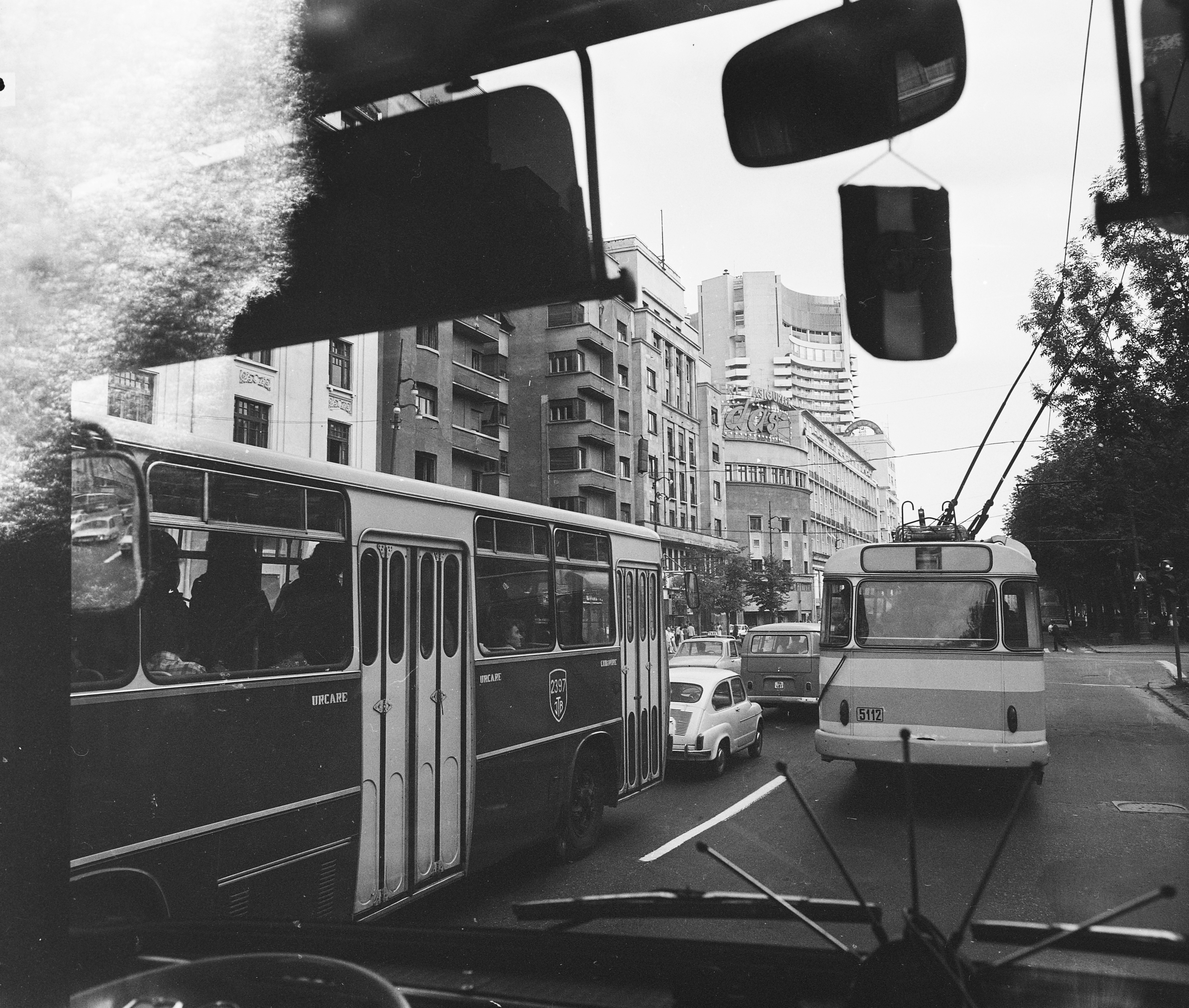 a Bulevardul Nicolae Bălcescu, háttérben a Hotel Intercontinental Bucharest. Location: Romania, Bucharest Tags: trolley bus, bus, Ikarus-brand, Hungarian brand, hotel Title: a Bulevardul Nicolae Bălcescu, háttérben a Hotel Intercontinental Bucharest.